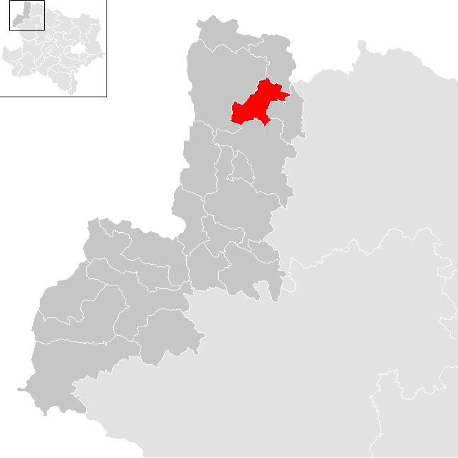 Bezirk Gmünd